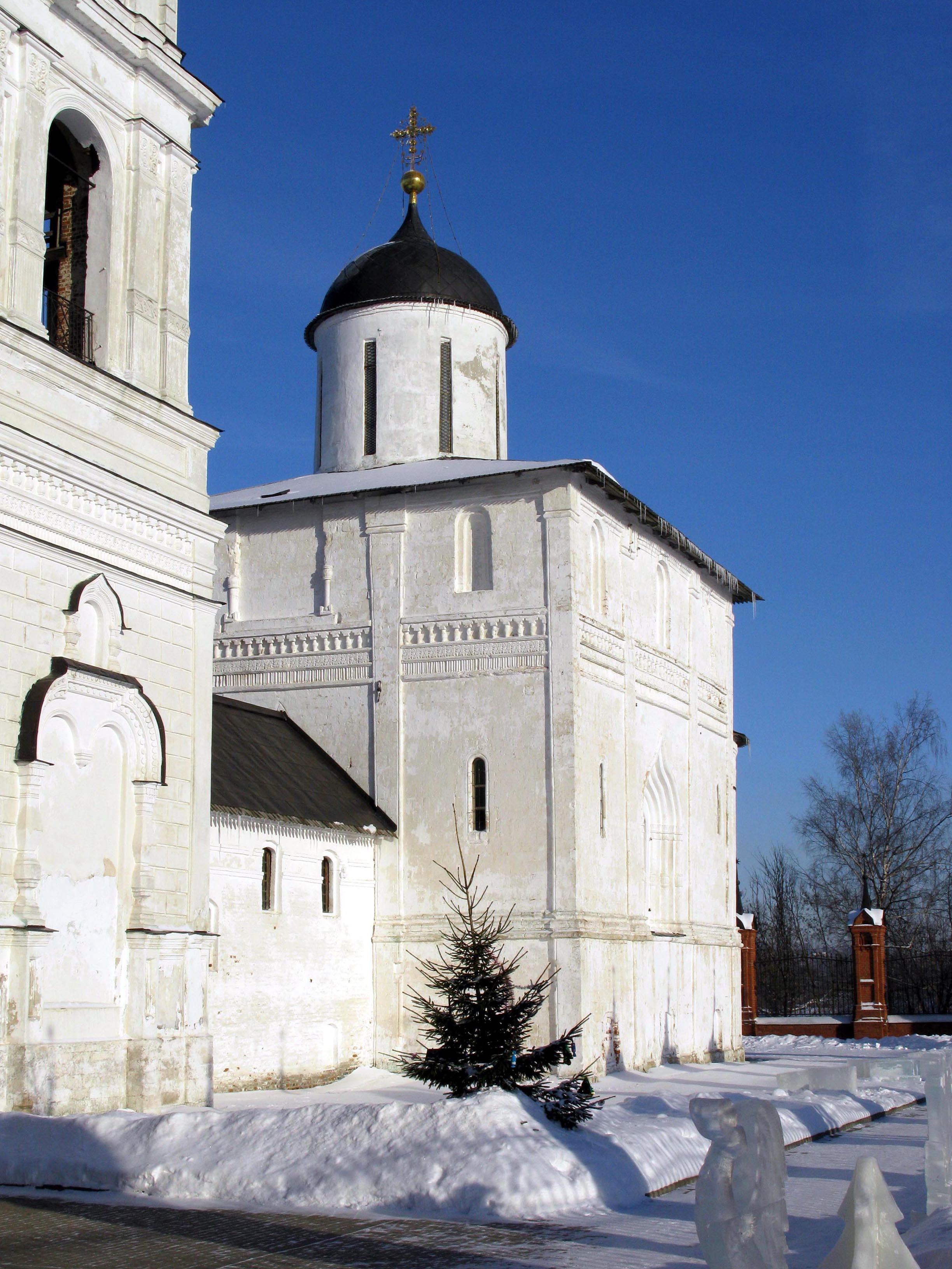 Собор Воскресения Христова (Волоколамск)